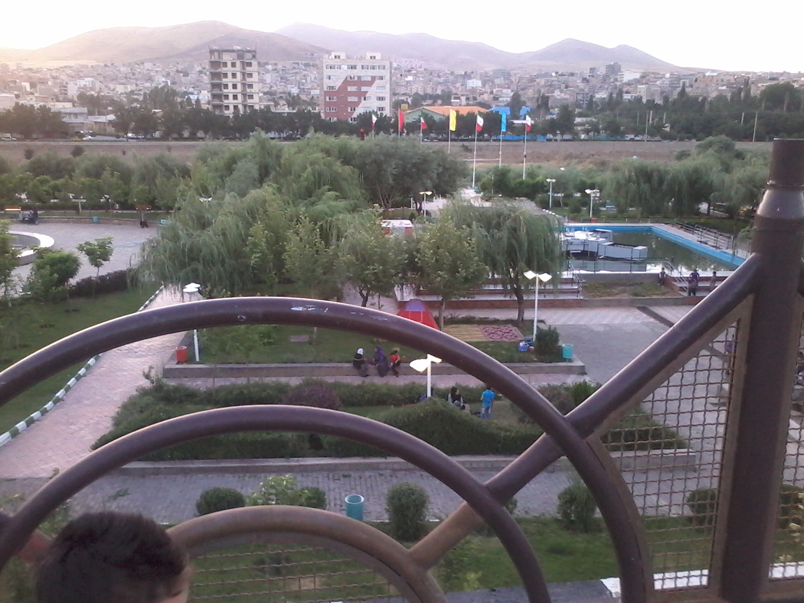 نمایی از پارک ساحلی کوثر سقز